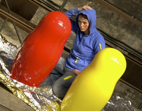 photographie réalisée lors de l'exposition "Off Sight" Paris Septembre 2008